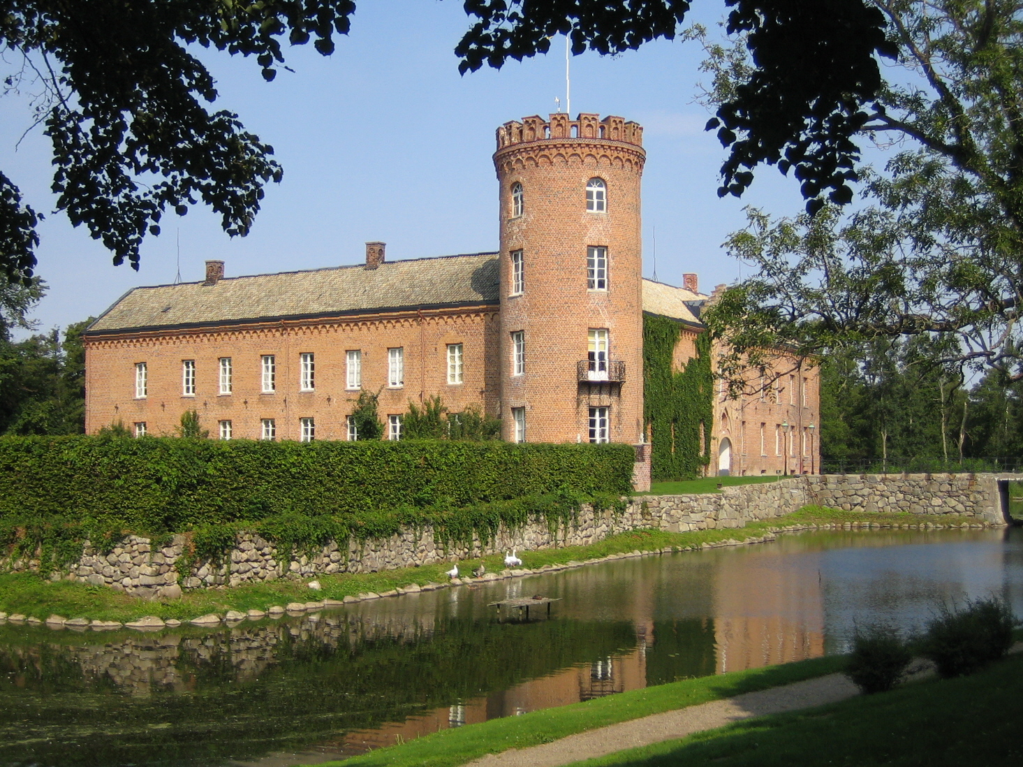 Sövdeborgs slott. Bilden tagen av mig själv 21 augusti 2005.